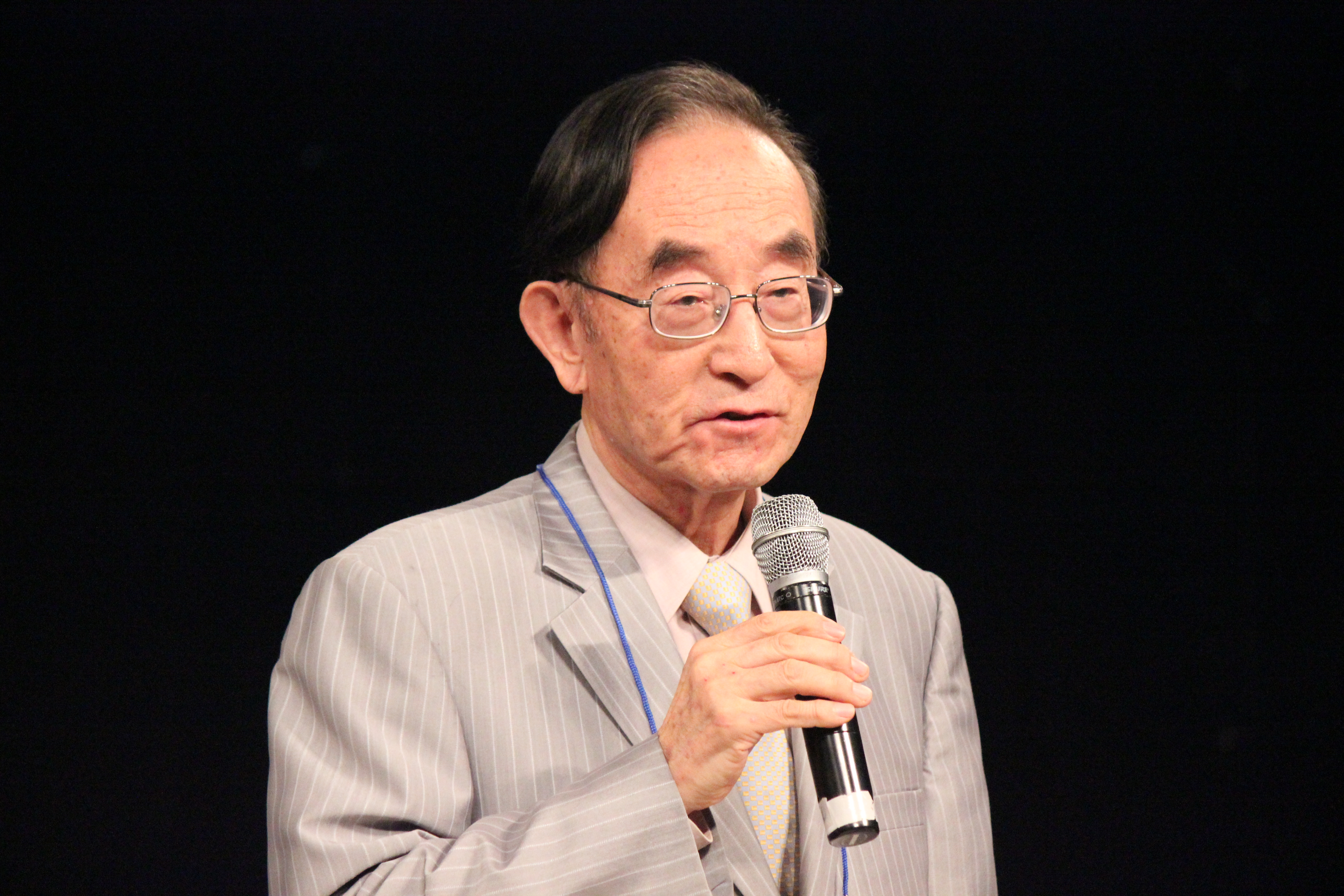 김명혁 박사(한국개혁신학회, 온누리교회, 서울)